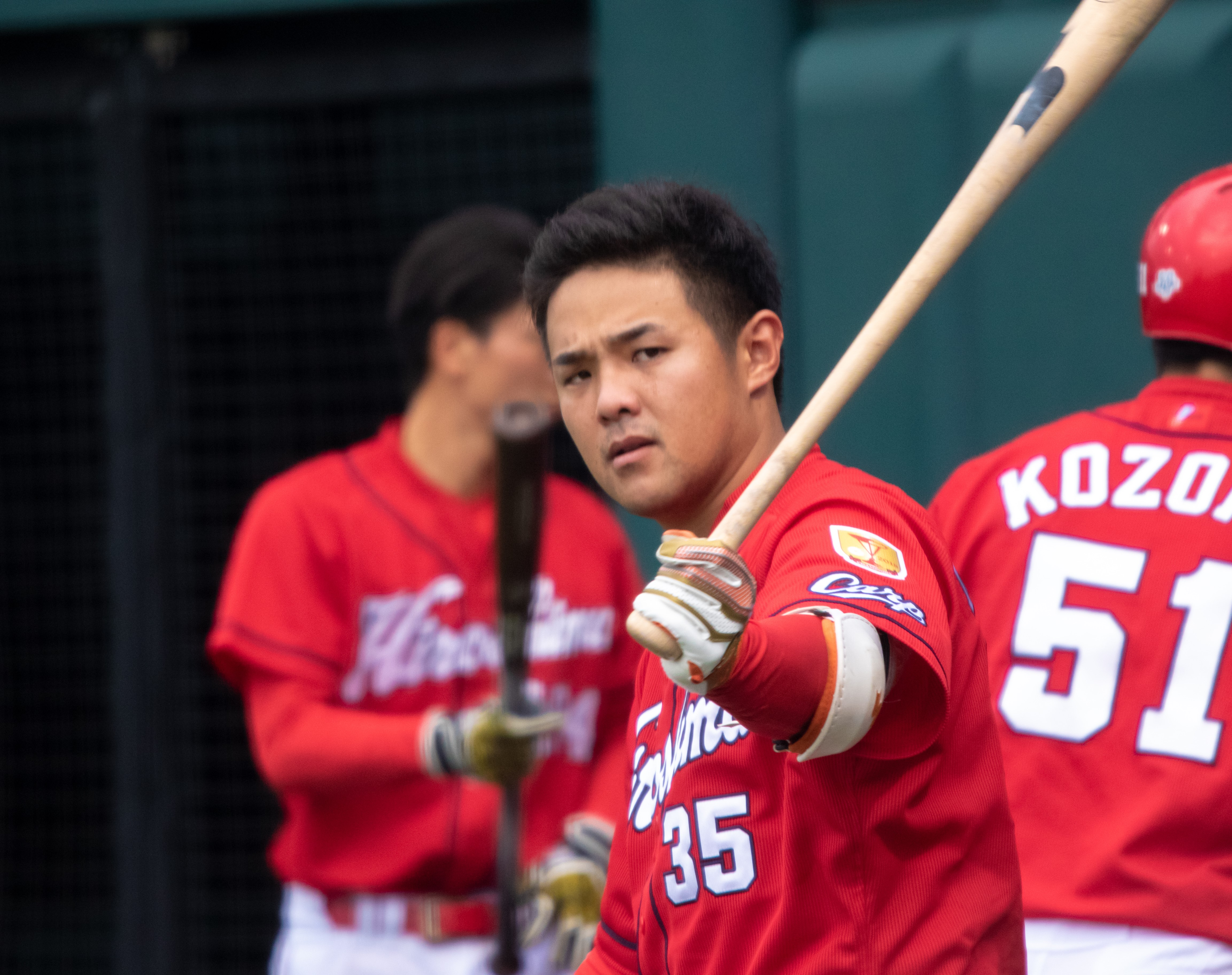 2019/7/25 タマホームスタジアム筑後